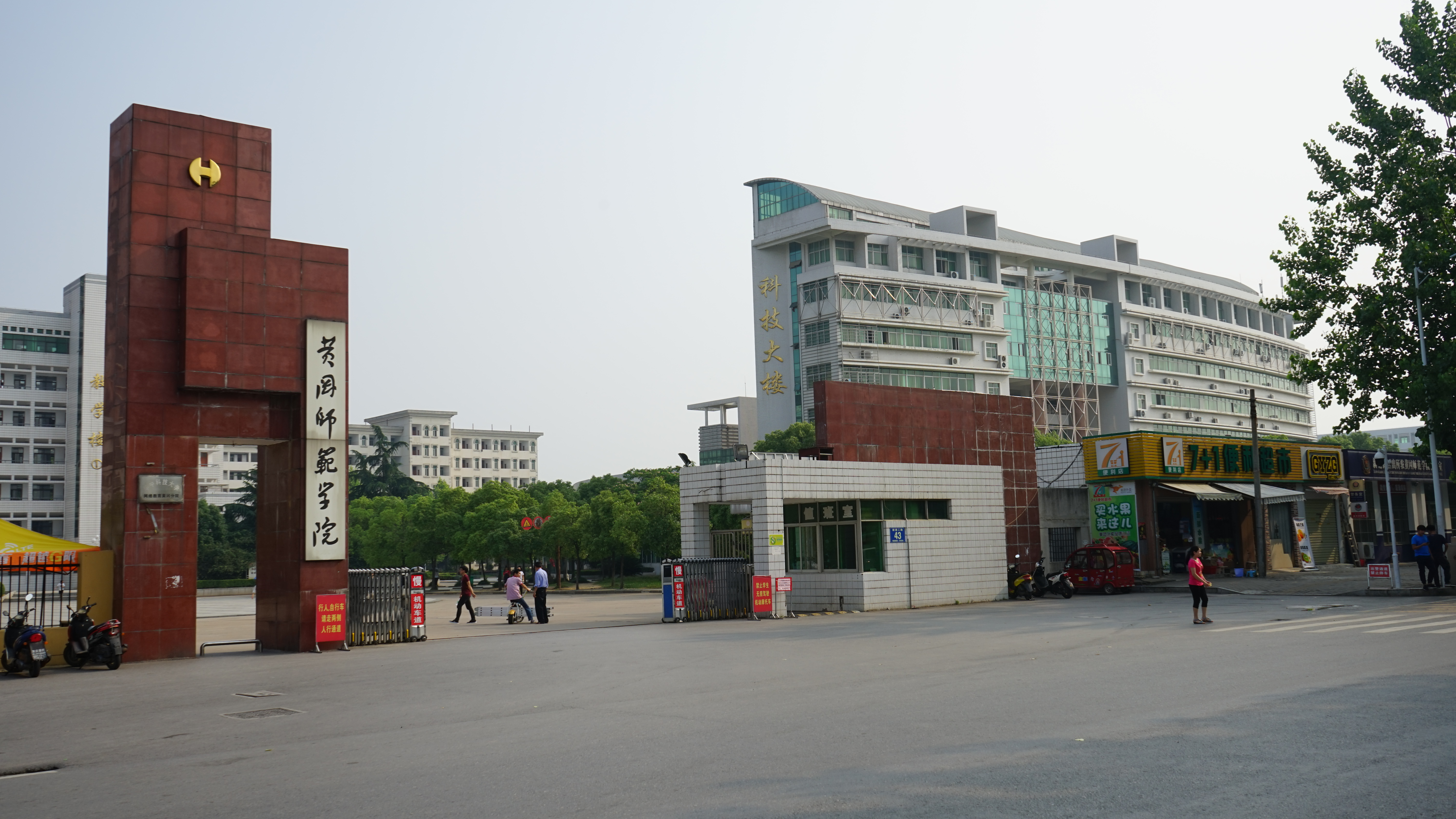 黄冈师范学院科技大楼